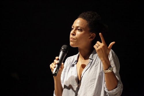 Beth Coleman